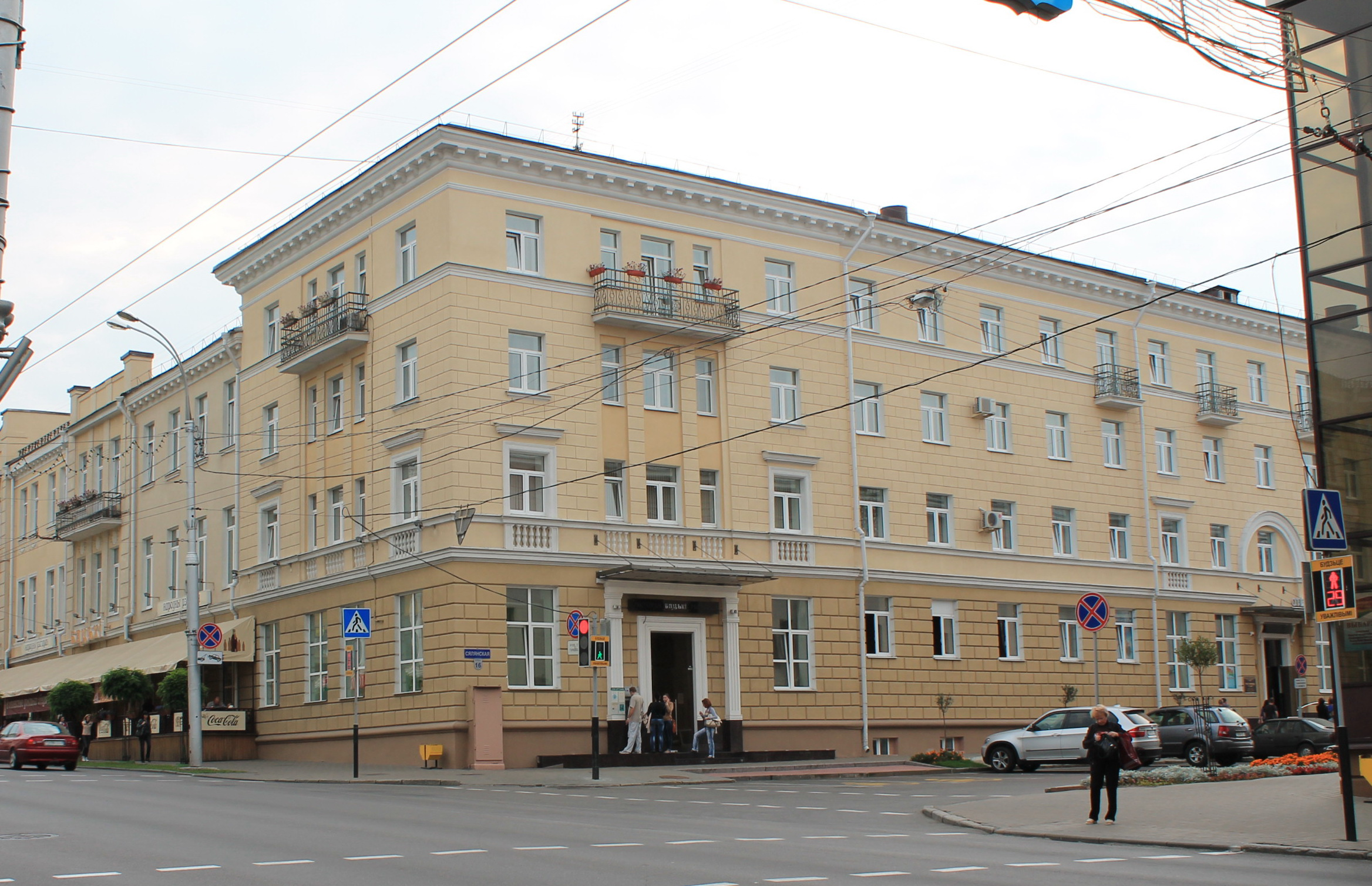 Беларуская (тарашкевіца): Забудова вул. Савецкай. г. Гомель This is a photo of Belarusian heritage monument. Reference number: 313Г000074 ( WLM)